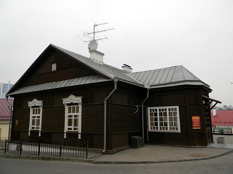 Драўляны дом у Верхнім горадзе